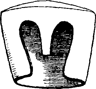 Ранні ўзор Вялікі шлем. Англія, пачатак 13 ст.